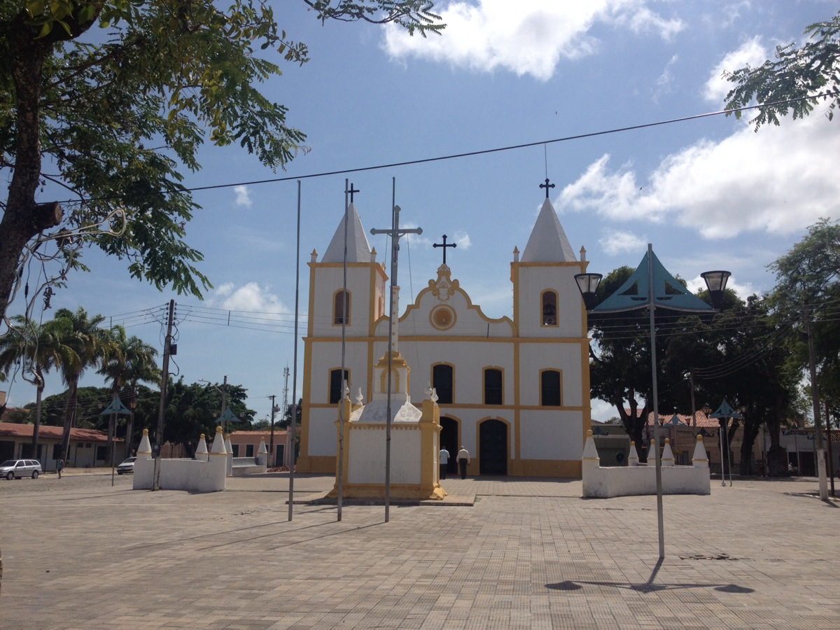 Praça central e Igreja Matriz de São José de Ribamar.